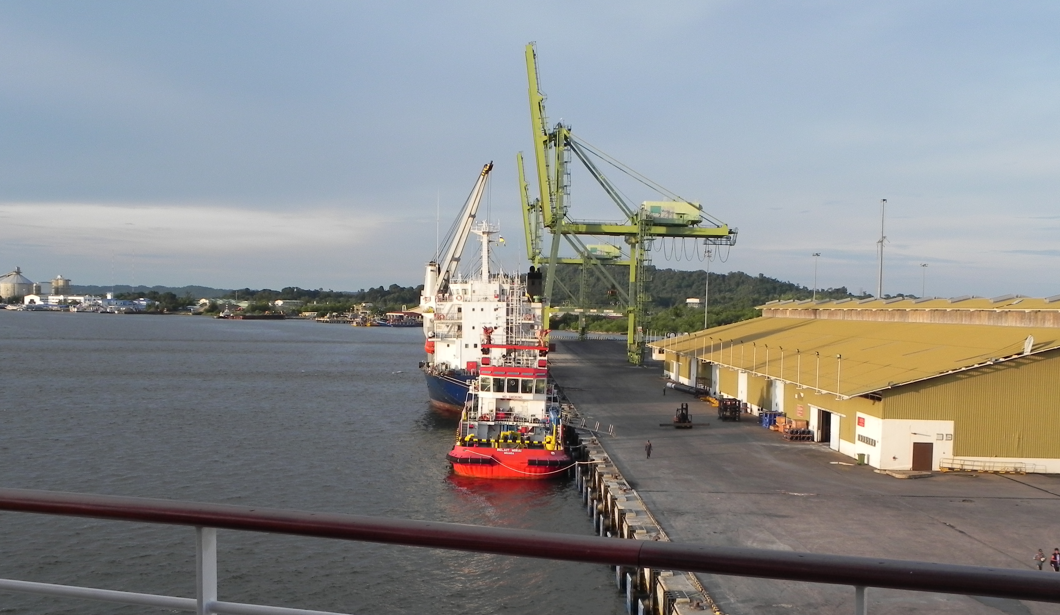 Hafen von Muara (Brunei)